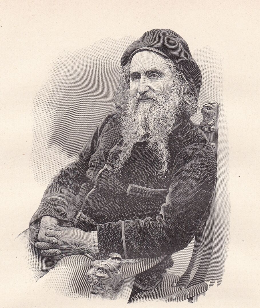 French geographer Onésime Reclus (1837-1916)